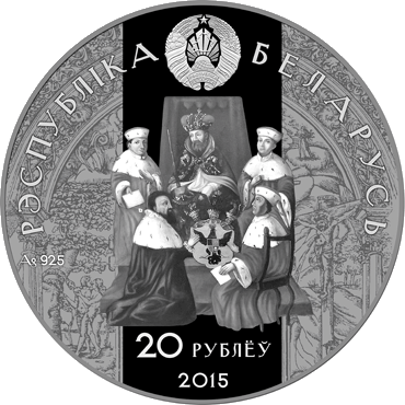 Беларуская (тарашкевіца): Памятная манэта «Мікалай Радзівіл Чорны (Mikałaj Radzivił Čorny)»